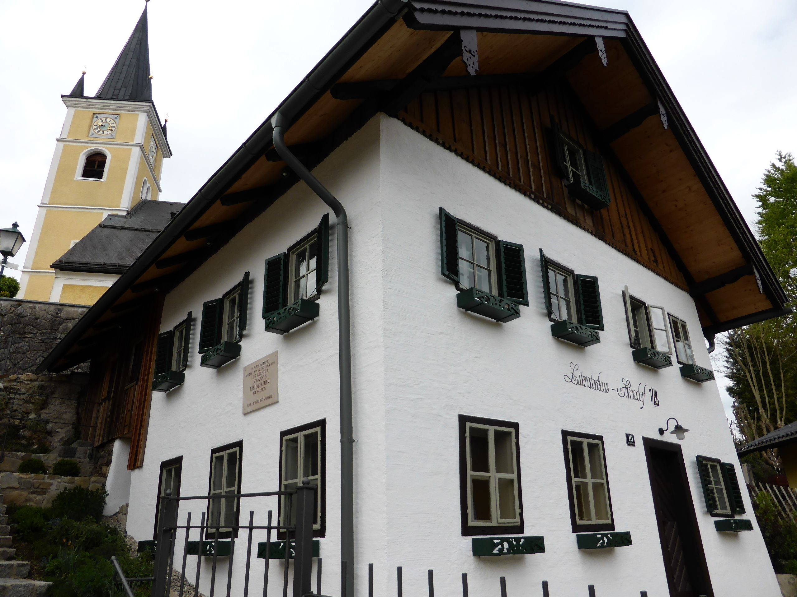 Bürgerhaus, Häusl an der Jägerleiten 82, Freumbichler-Haus